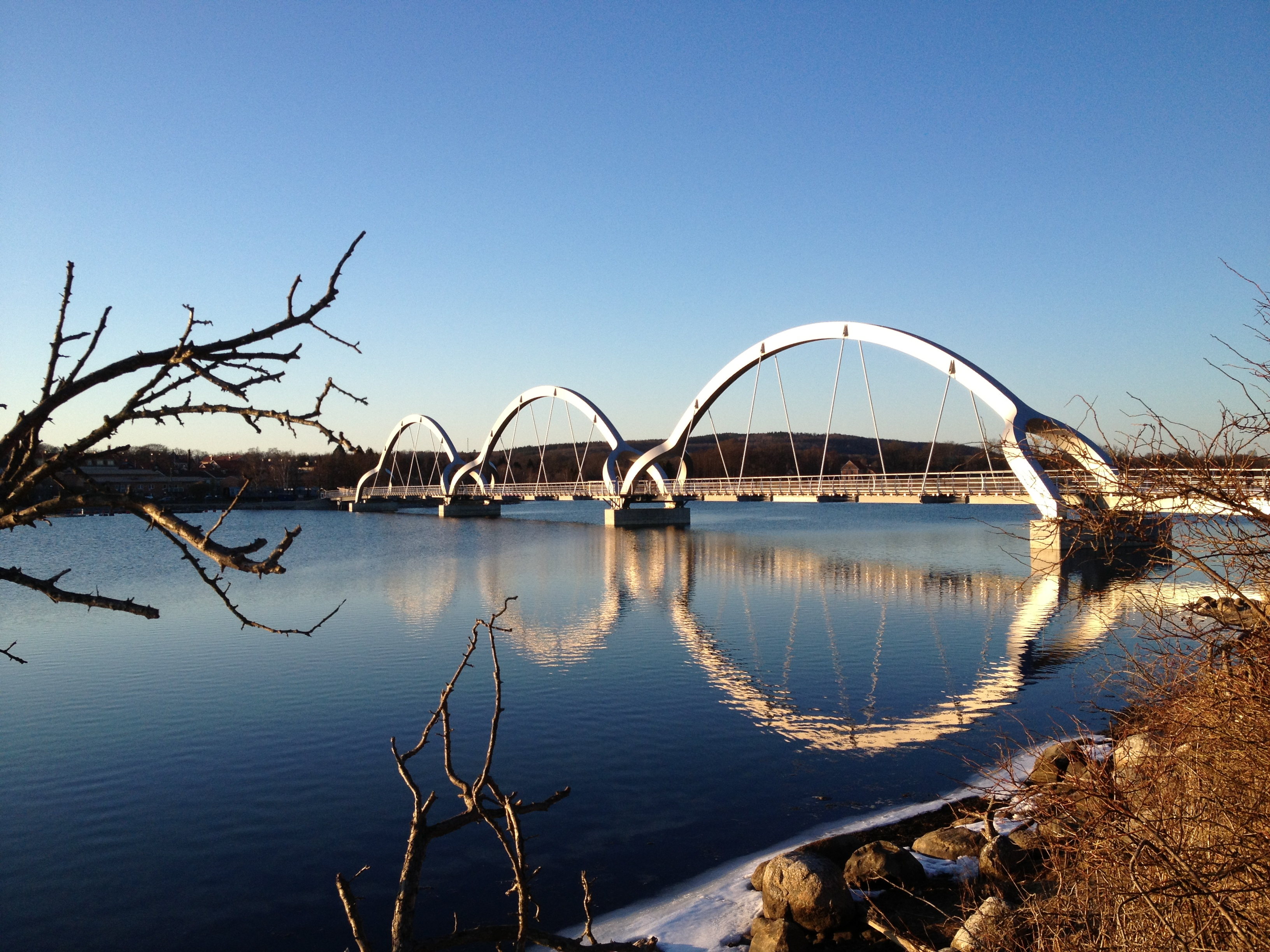 Detta är den mer spektaklulära delen. De första 240 m av den totalt 759 m långa bron.